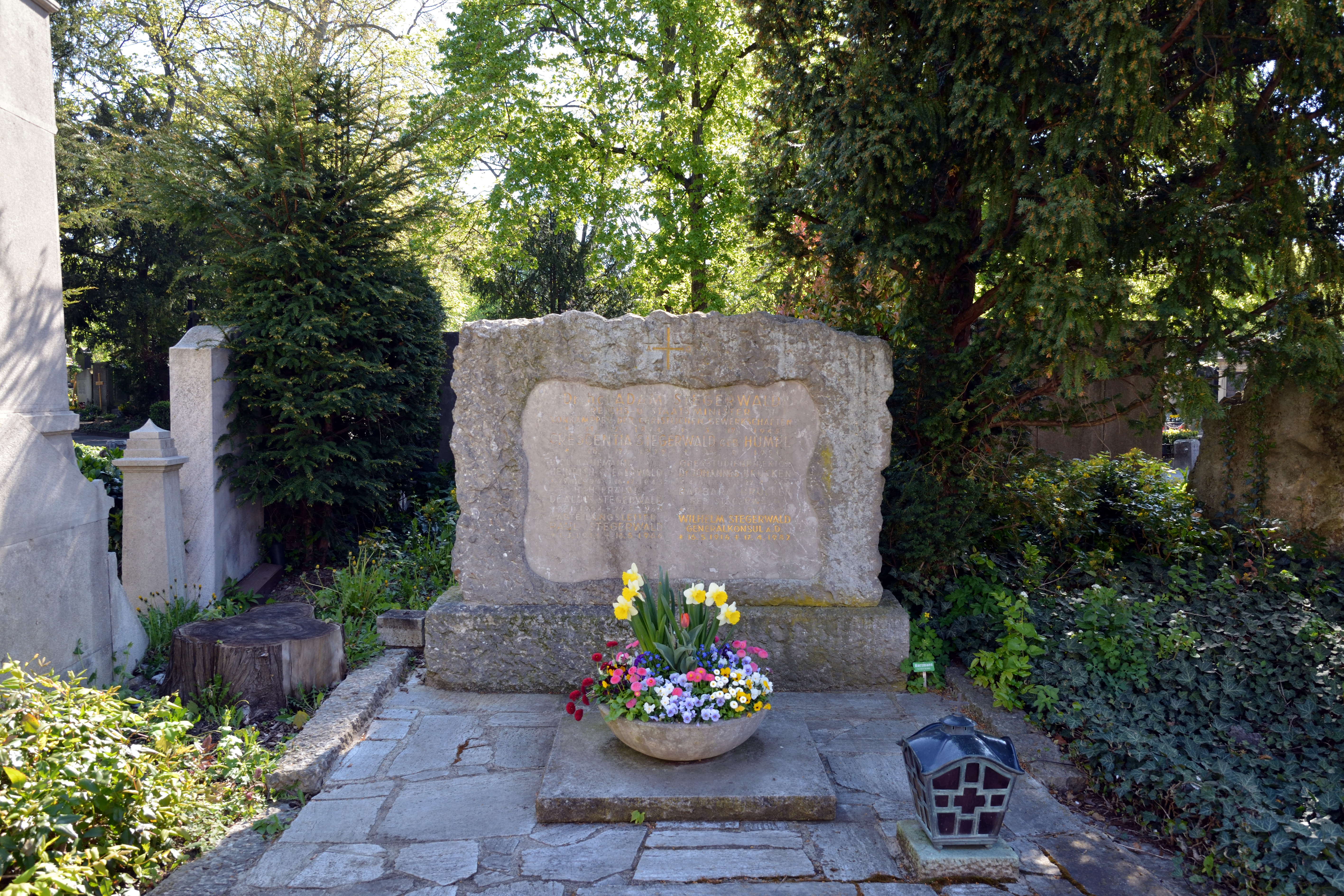 Impressionen vom Hauptfriedhof Würzburg Adam Stegerwald